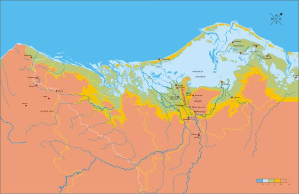 Transgression marine rive Est de la Mer du Nord (de 250 à 600)